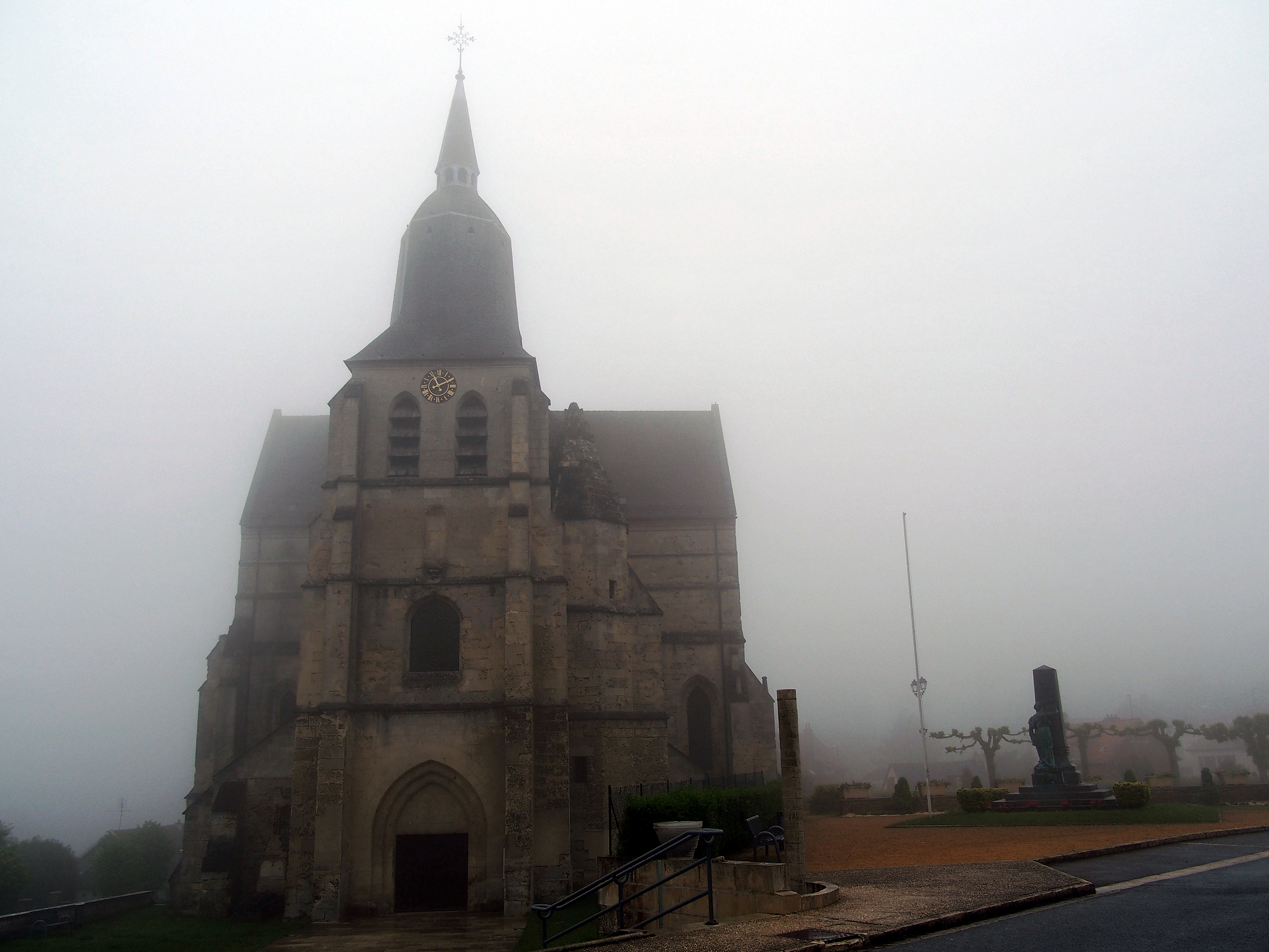 Église Saint-Gobain de Saint-Gobain (classée, 4 mai 1921) .